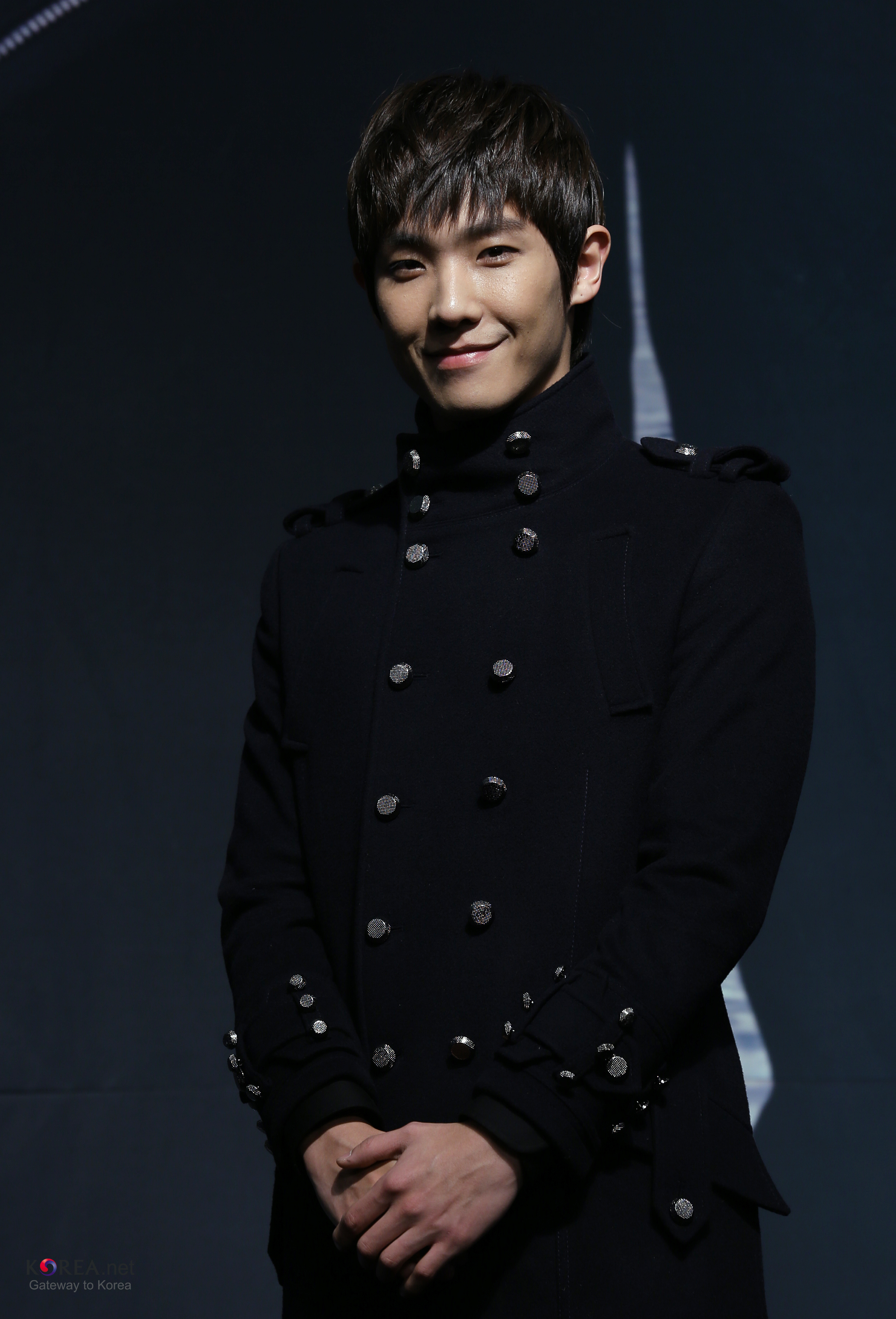 K-Drama 'IRIS 2' Press Conference Lee Joon (MBLAQ) Lotte Hotel, Seoul 2013.02.07. Ministry of Culture, Sports and Tourism Korean Culture and Information Service Jeon Han Articles about IRIS2 Korean blockbuster drama Iris returns (日本語) 韓国ドラマ、2013年のキーワードは“アクション” ブロックバスタードラマ「アイリス(IRIS)２」、いよいよ放映 (中文) 2013年韩剧的关键词为“动作” 风靡一时的韩剧《IRIS》将重返荧幕 (Vietnamese) Phim truyền hình hành động lên ngôi năm 2013 Phần 2 của phim truyền hình bom tấn 드라마 아이리스2 제작발표회 NSS 요원 윤시혁 역의 이준 롯데호텔, 서울 문화체육관광부 해외문화홍보원 코리아넷 전한